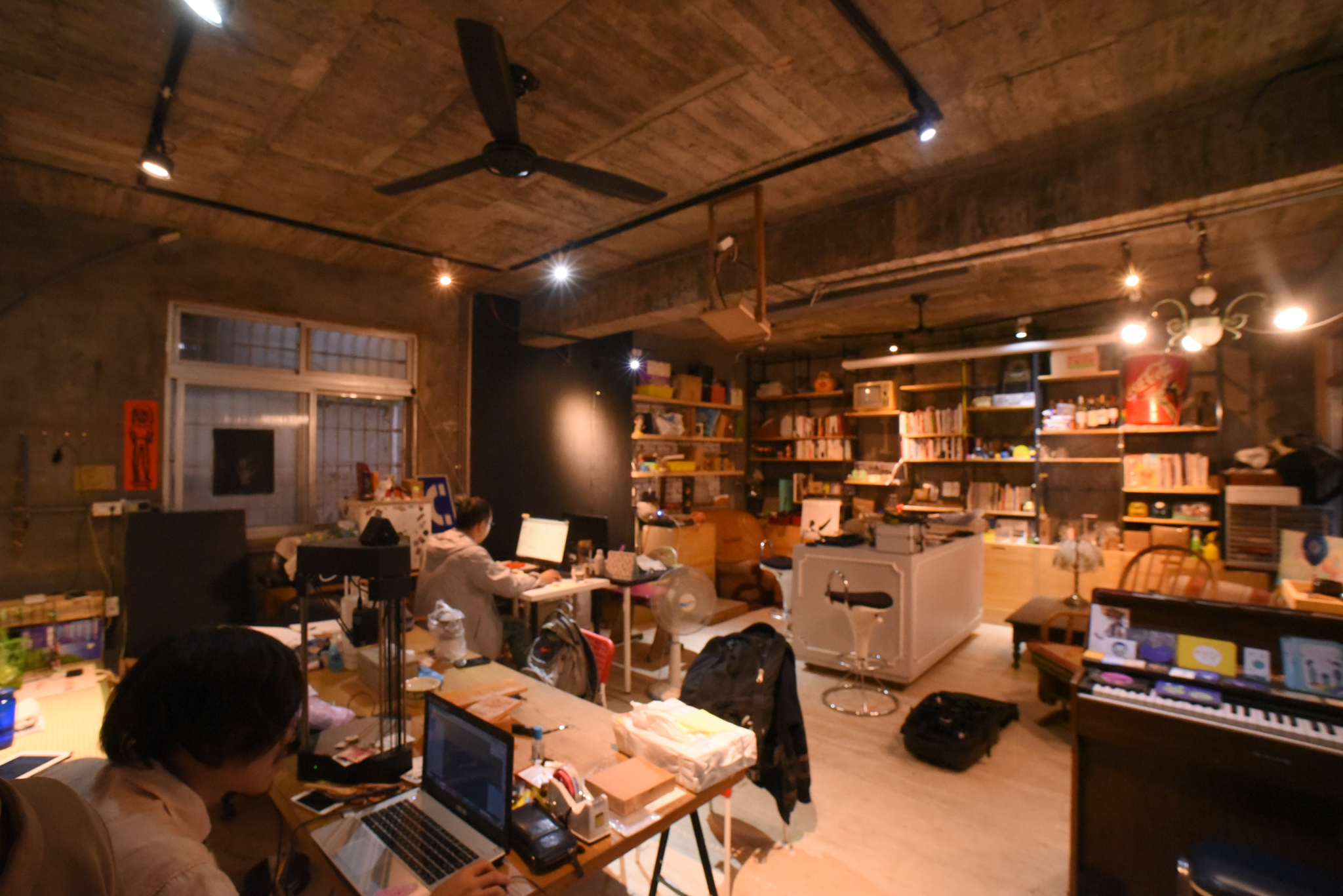 作伙位於1F的公共空間